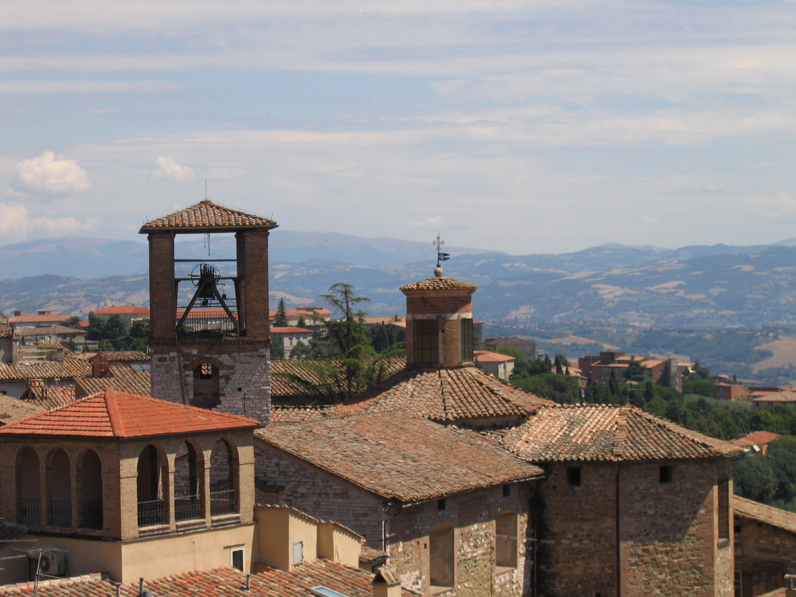 Fotografía desde un mirador situado en lo alto del opidum que ofrece un amplio panorama del llano de Umbría (Italia).